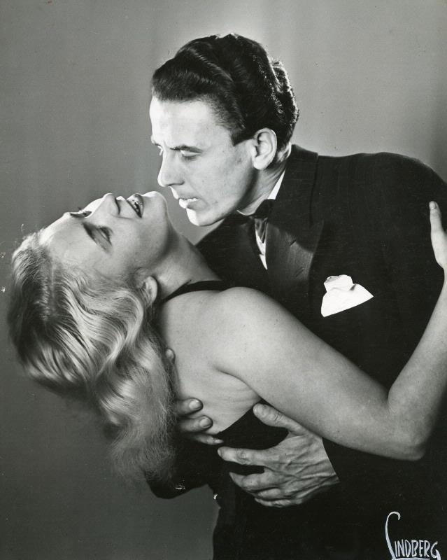 Siv Thulin och Bertil Sjödin i Fan ger ett anbud på Helsingborgs stadsteater